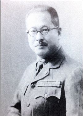 少年団日本連盟理事時代のw:二荒芳徳